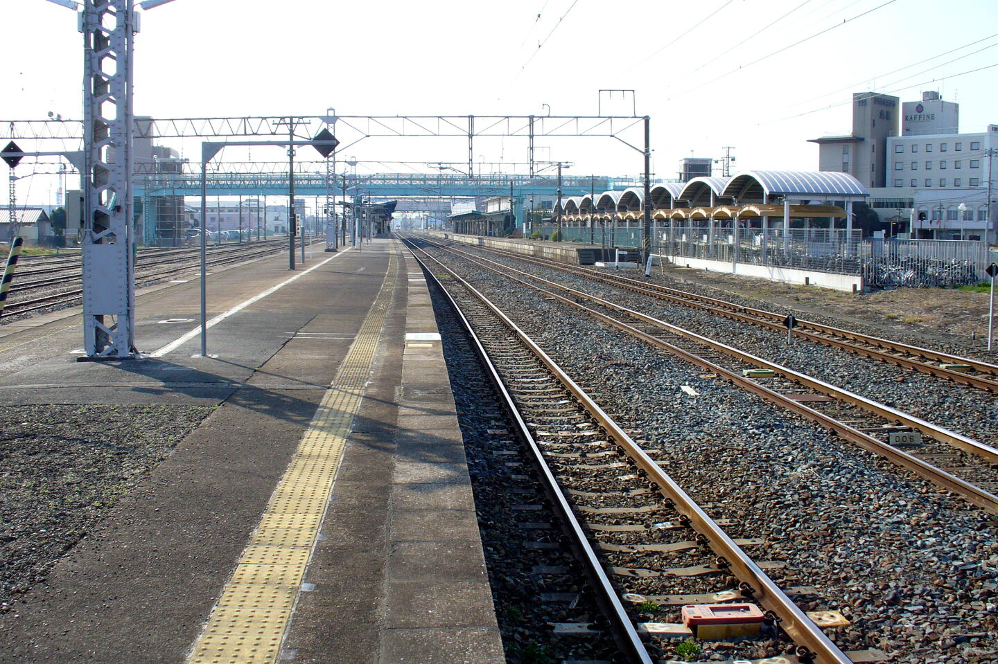 常磐線原ノ町駅（構内）